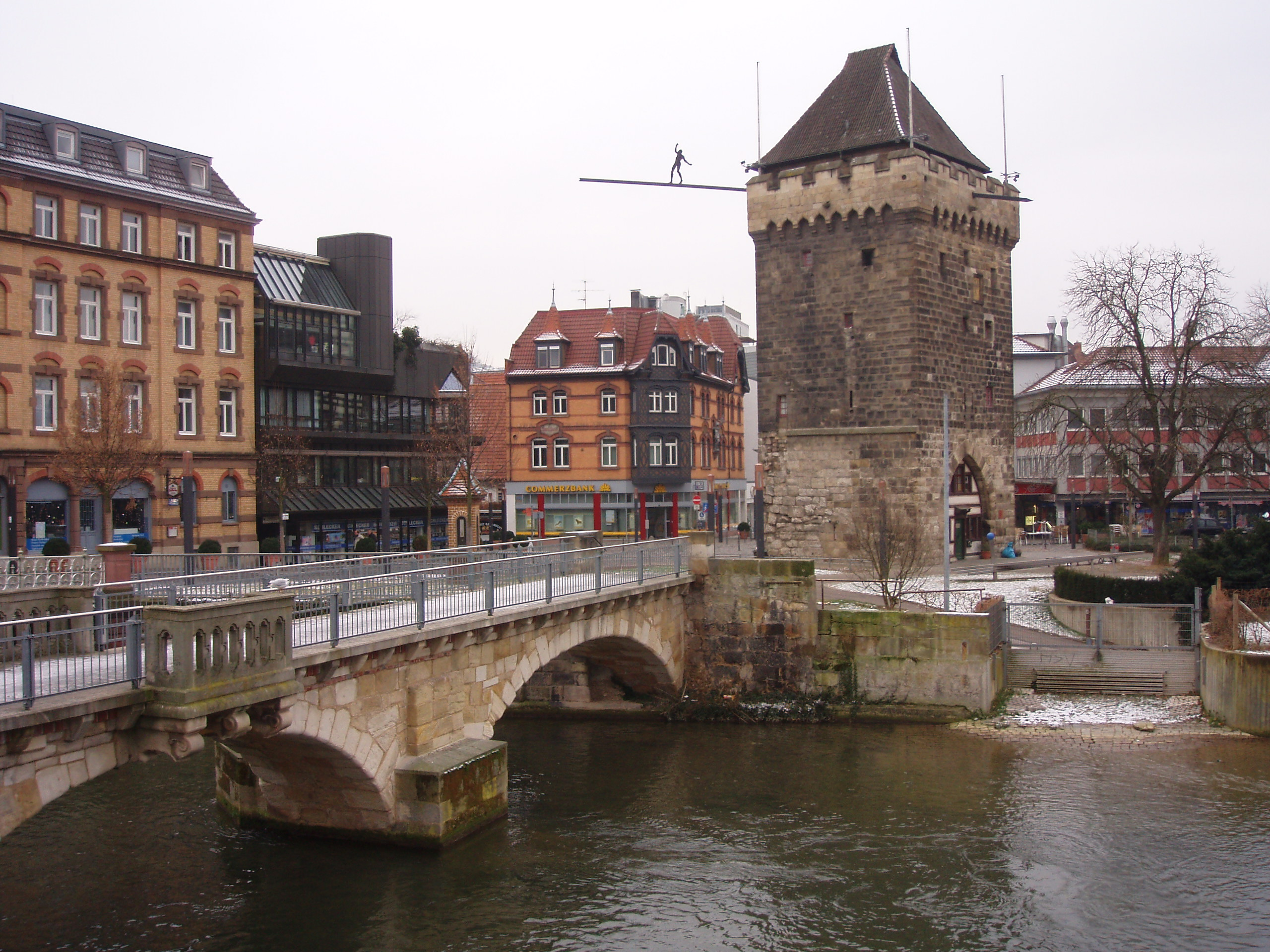 Schelztorturm